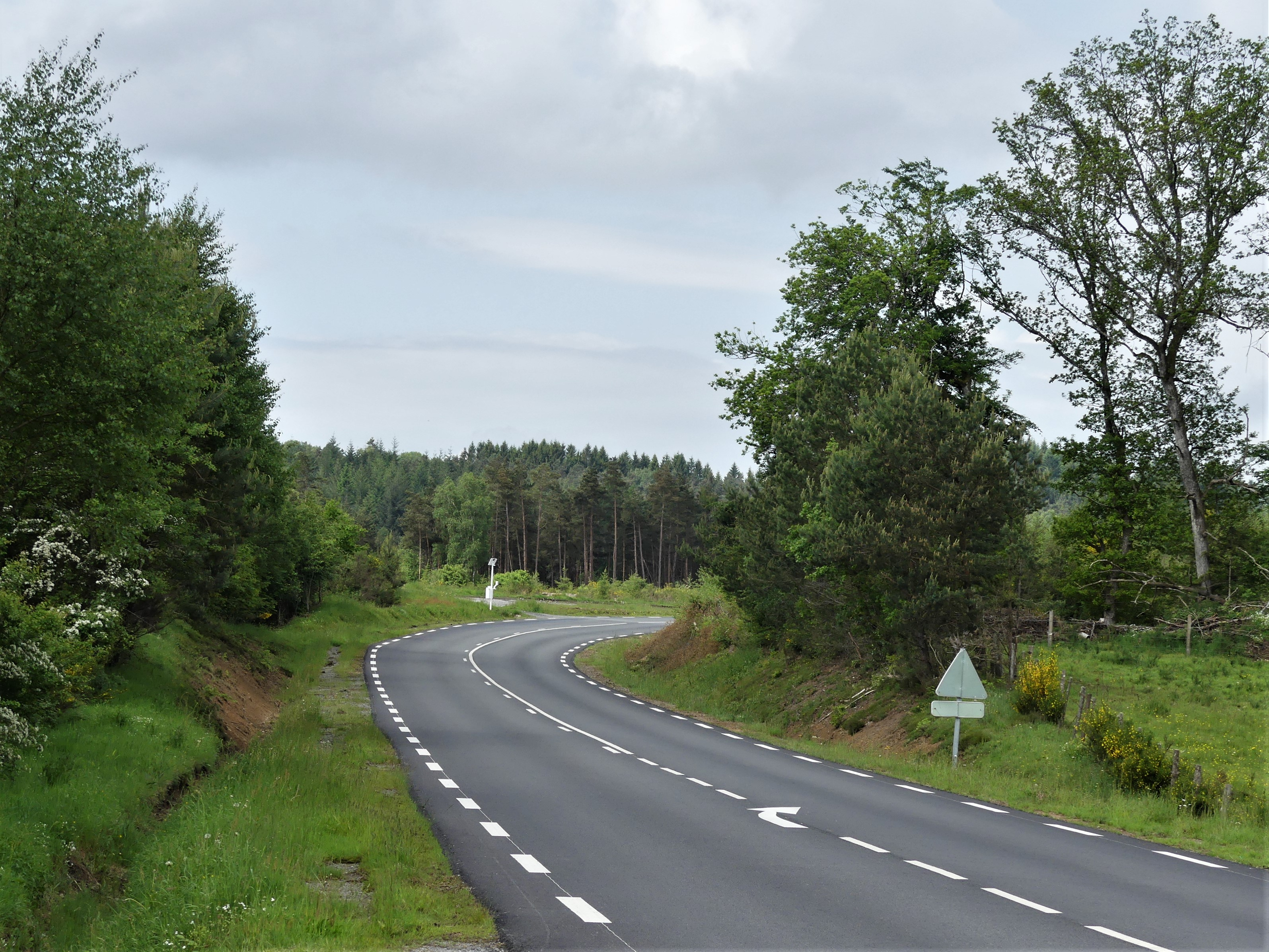 La route départementale (RD) 982 au niveau de l'intersection avec la RD 28, Le Mas-d'Artige, Creuse, France.